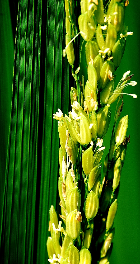 പൂത്തു നിൽക്കുന്ന നെൽച്ചെടി-flowered paddy